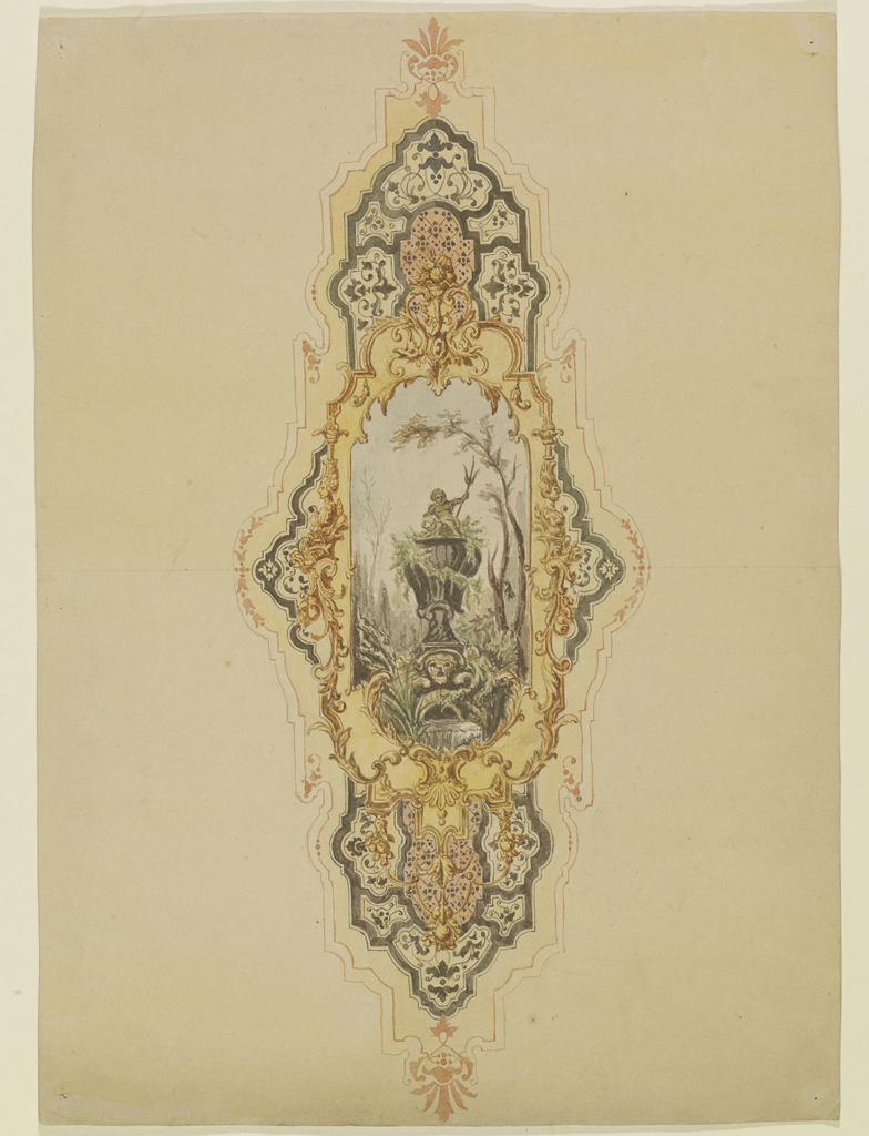 Das Aquarell zeigt ein Detail der Salondekortapete. Mittig ein ovales Bild mit figürlicher Darstellung, eingefasst in einen ornamentalen Rahmen. Aquarell von Olga Merck, 1903.